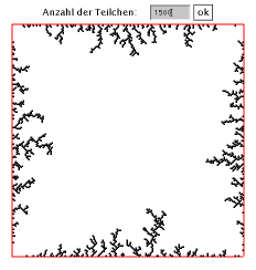 Anlagerung von Russteilchen (Simulation, Verwendung eigener Java-Klasse)